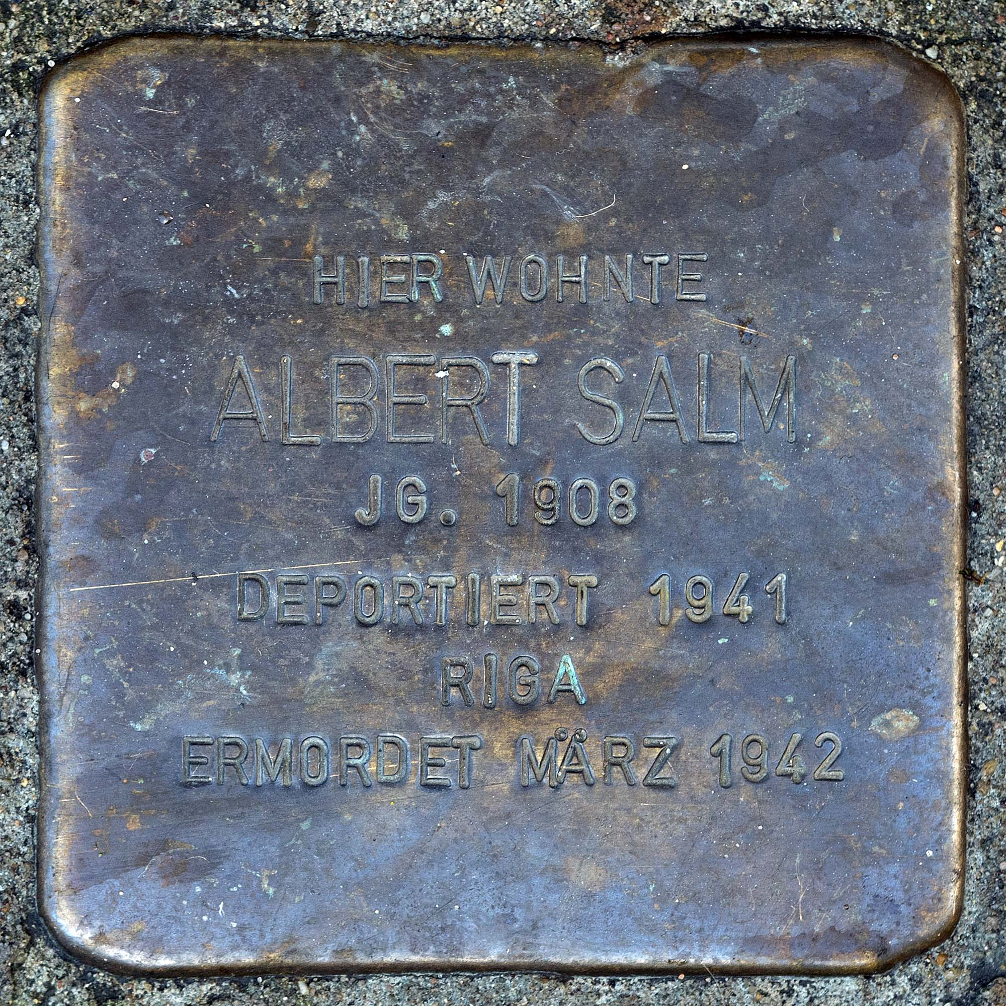 Stolperstein für Salm Albert